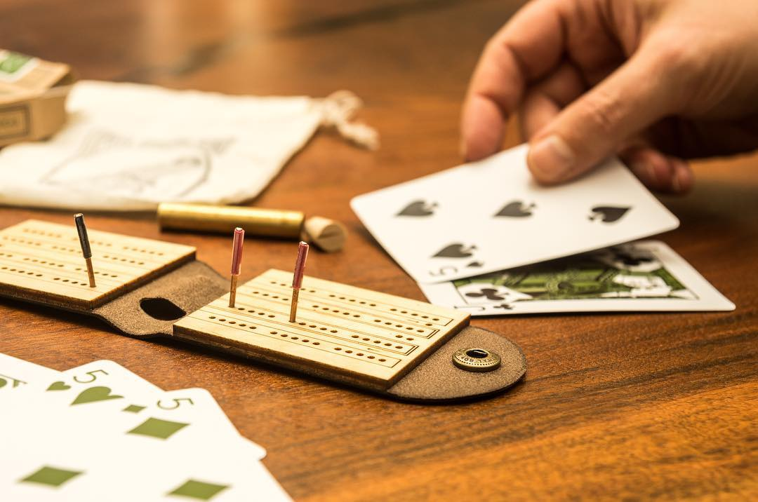 via Instagram ift.tt/2zOhWIO